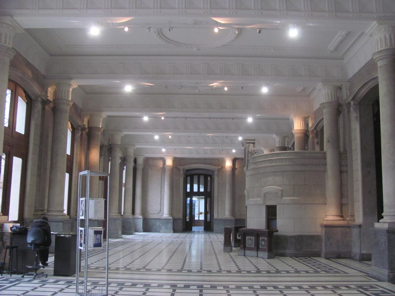 Estación Santa Fe, Ferrocarril Belgrano, Argentina.